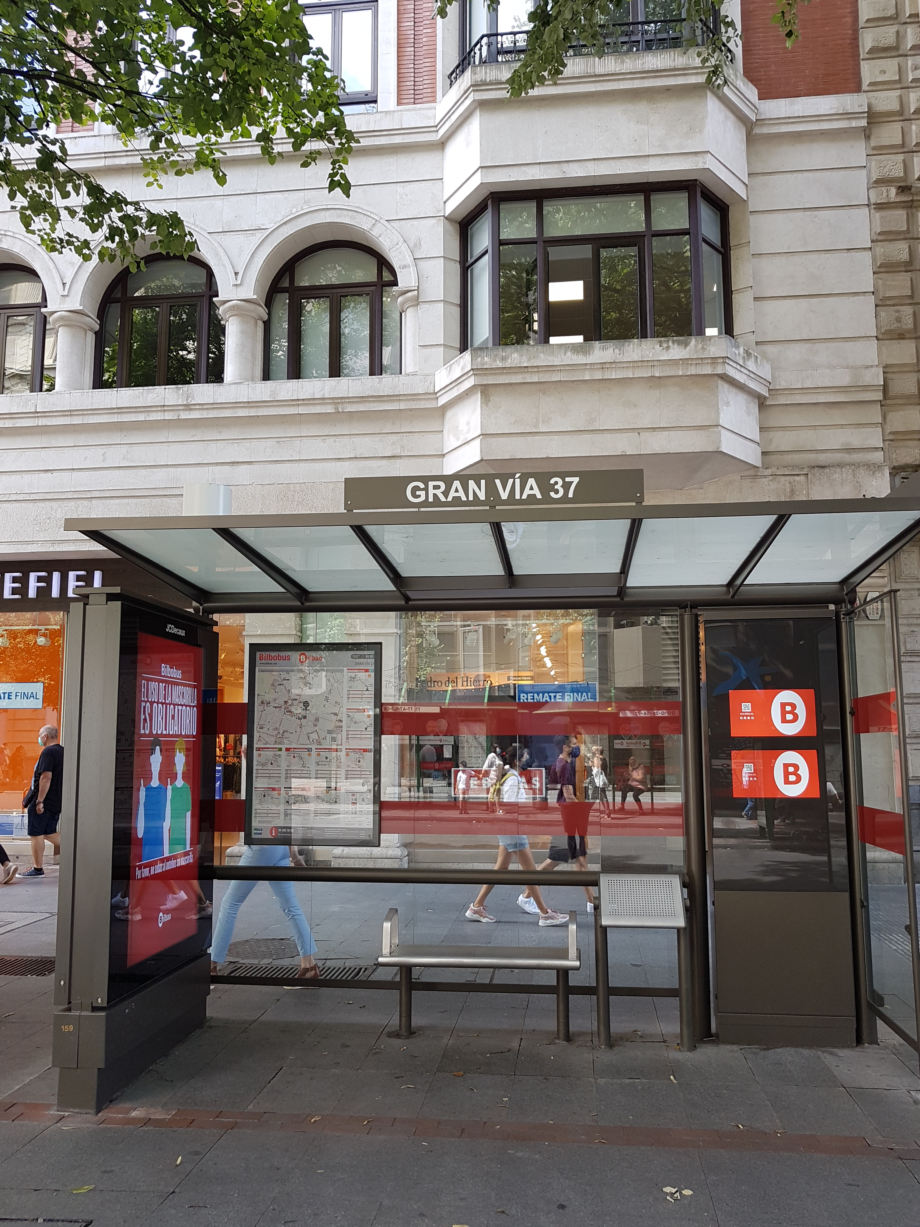 Nuevas marquesinas en Bilbao de las paradas de Bilbobus y Bizkaibus diseñadas por el arquitecto británico Norman Foster.